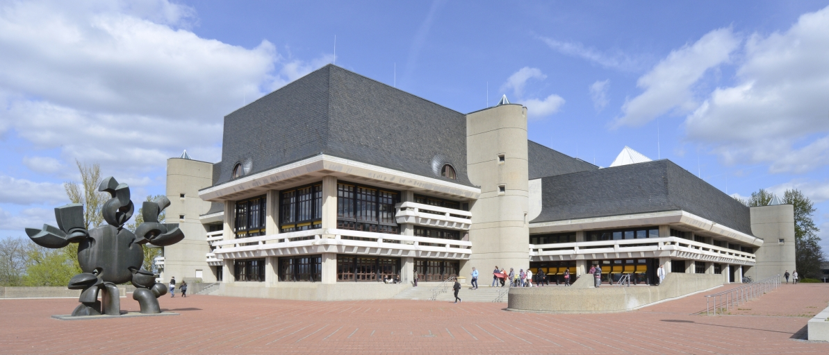 Zentralbibliothek am Hubland der Universitätsbibliothek Würzburg